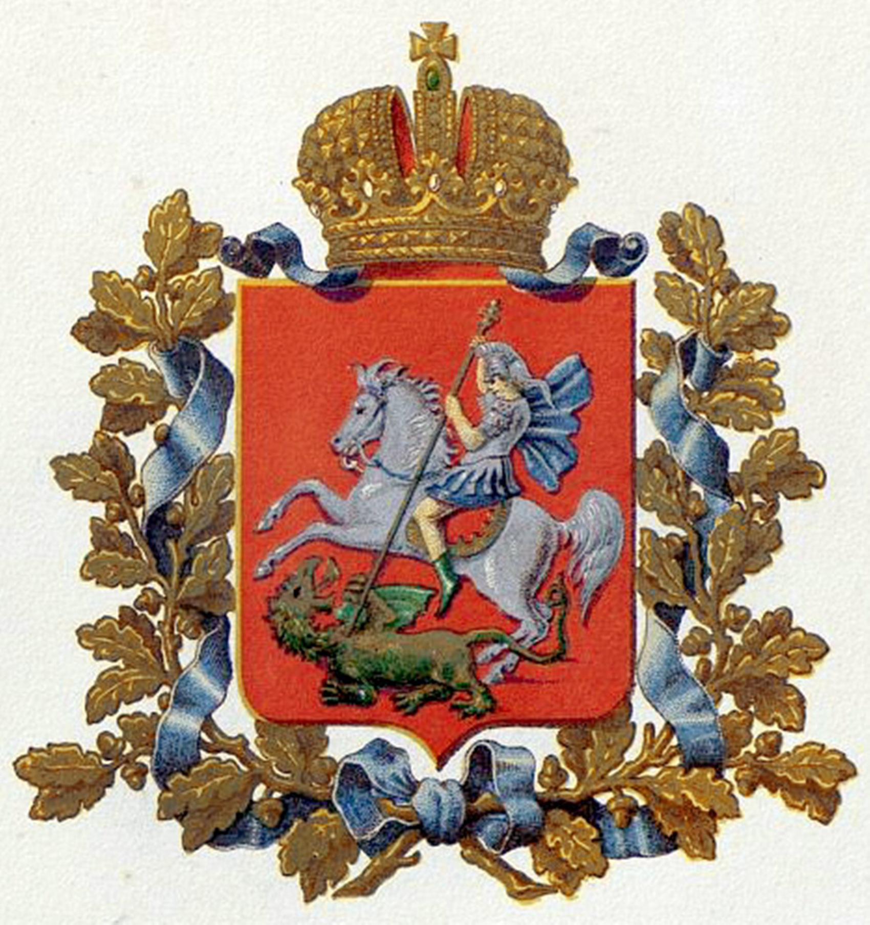 Official Russian Empire coat of arms Moskva Governorate. Герб Российской Империи Московской губернии в Гербовнике МВД. Утверждён Императором Всероссийским Александром Вторым в 1878 году.